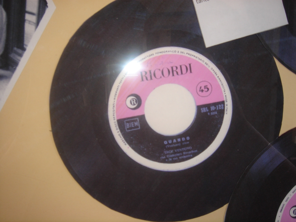 Un 45 giri di Luigi Tenco